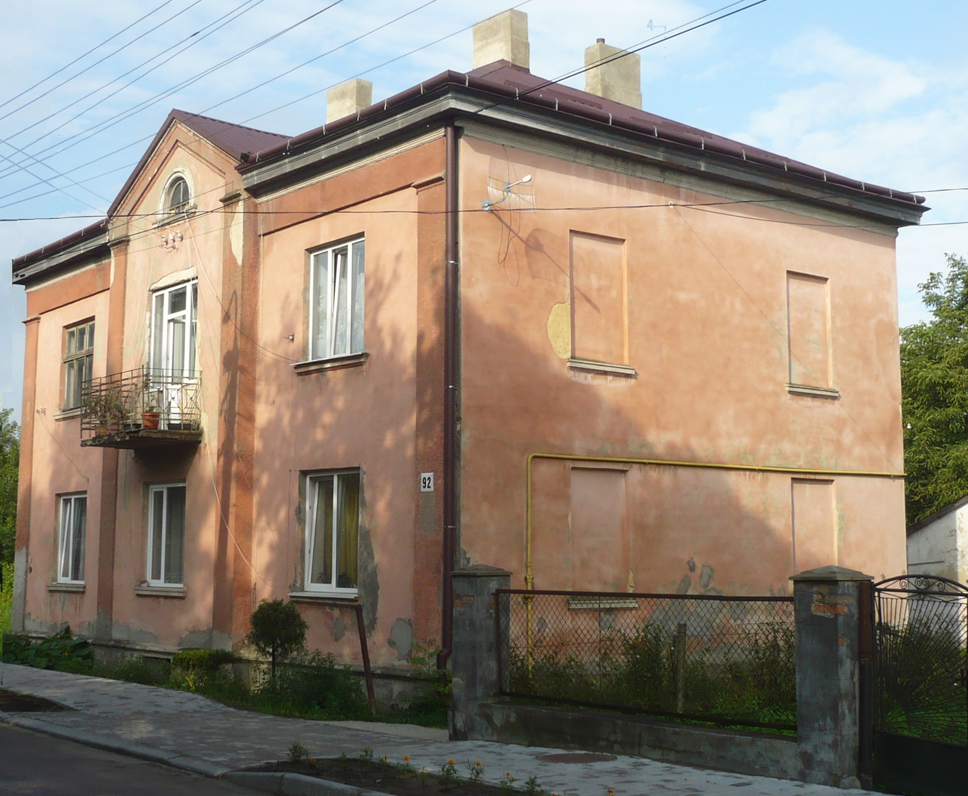 Kamienica w Złoczowie